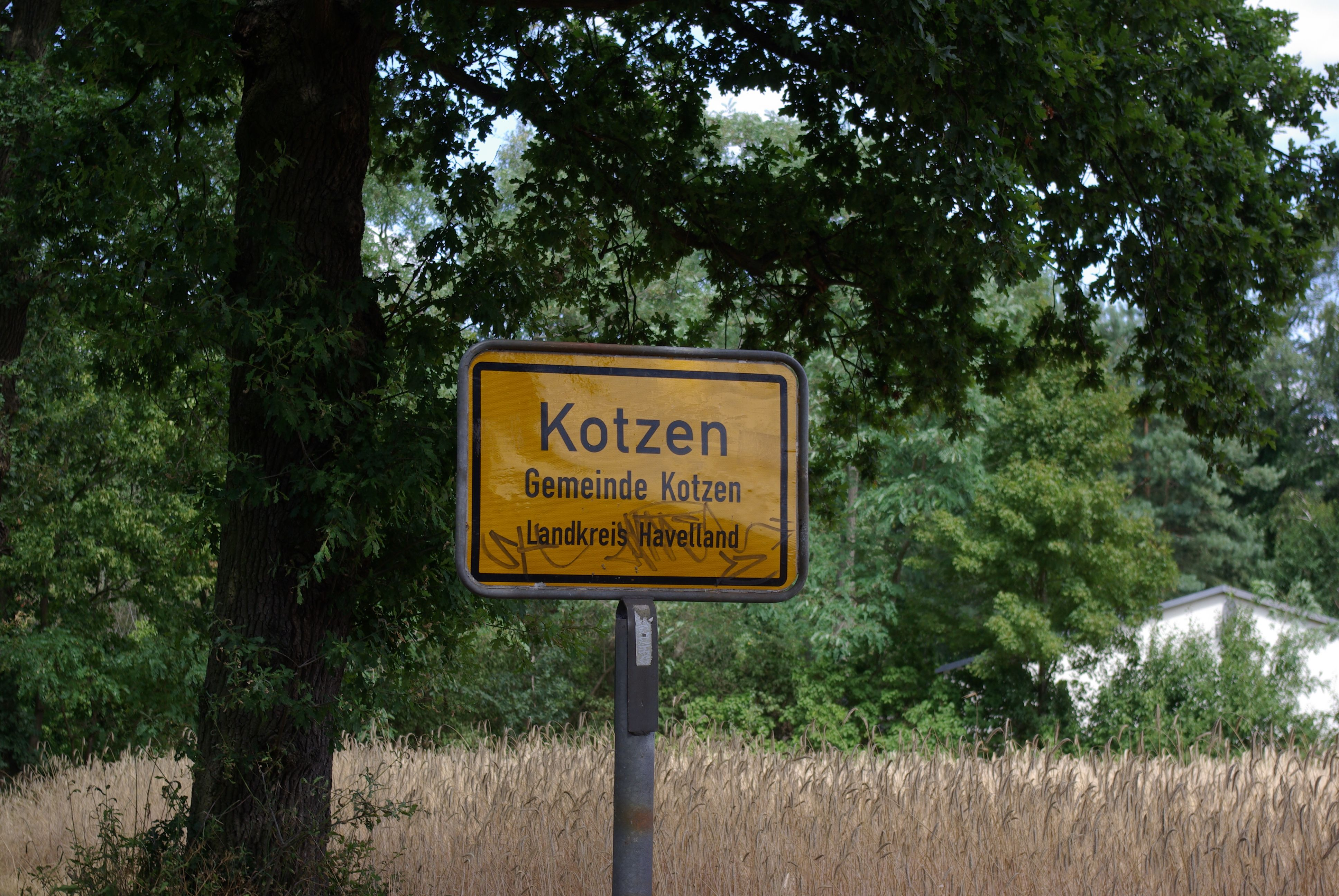 Kotzen in Brandenburg. Das Ortsschild steht an der Straße von Nennhausen.